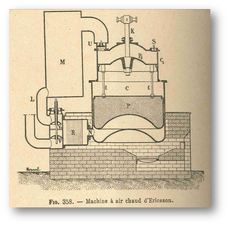 Gravure d'un moteur Ericsson M1851 avec "régénérateur" type Stirling. Source Machines à vapeur et machines thermiques diverses / par J. Dejust 1899